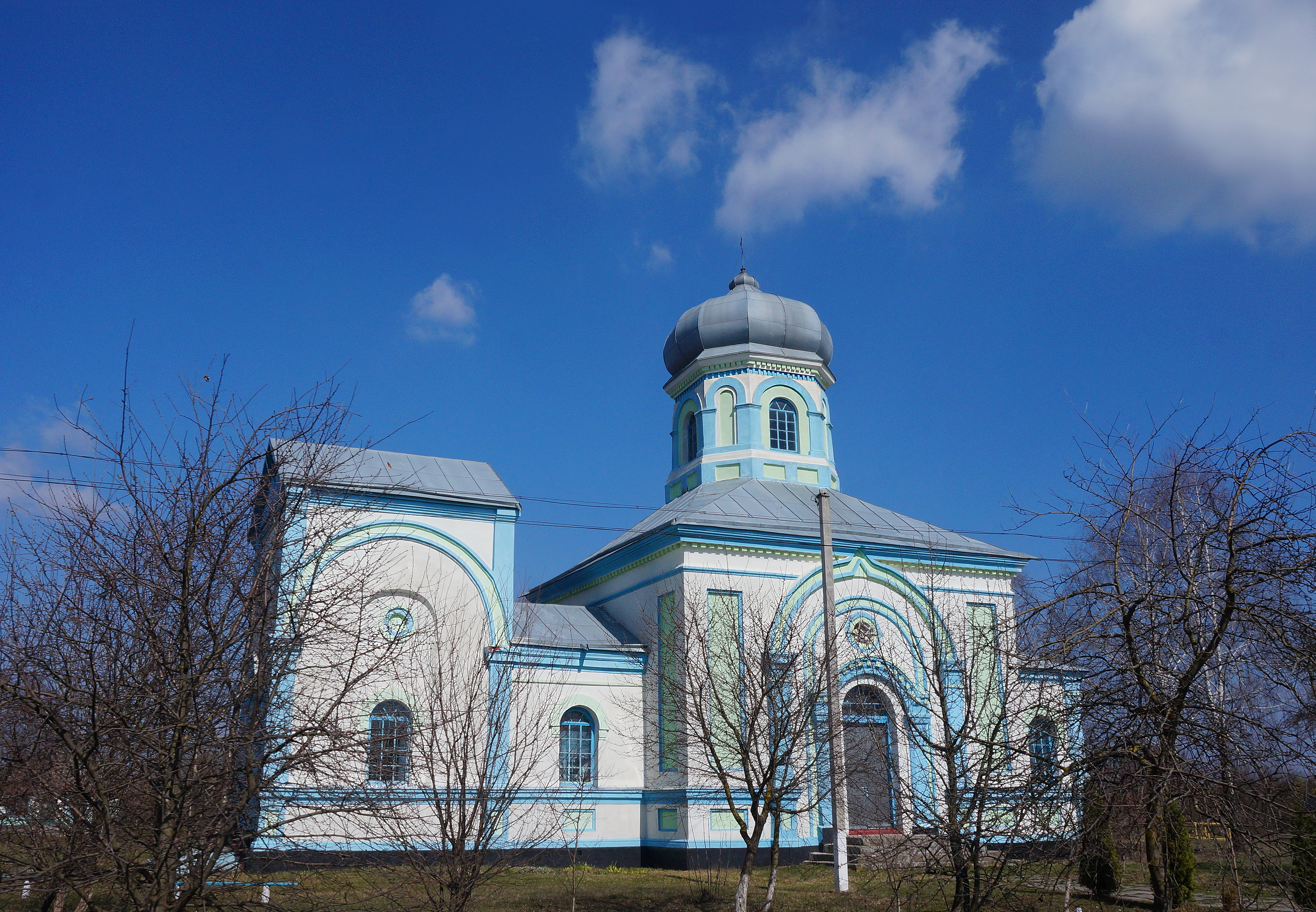 Георгіївська церква, село Пилява